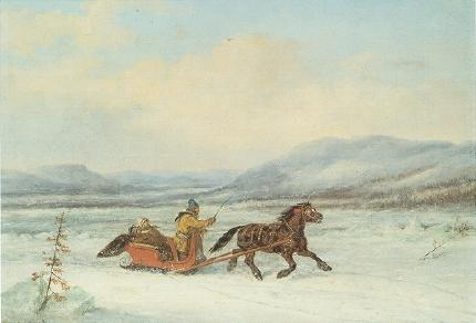 Sleigh Ride